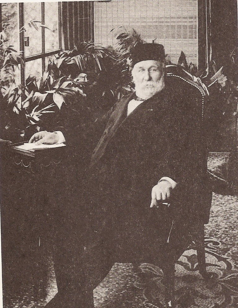 portrait de Jules Scrive-Briansiaux de Milleville